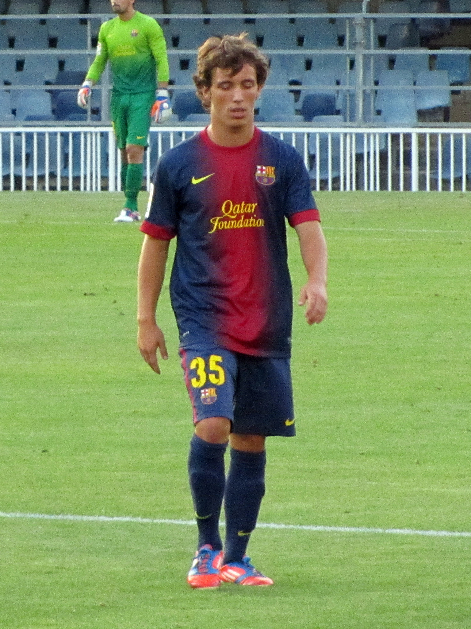 FC Barcelona B player Álex Grimaldo in a 2012-13 home kit. Foto realizada por Javier Segura (@castroquini)